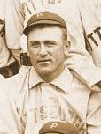 Denny Lyons